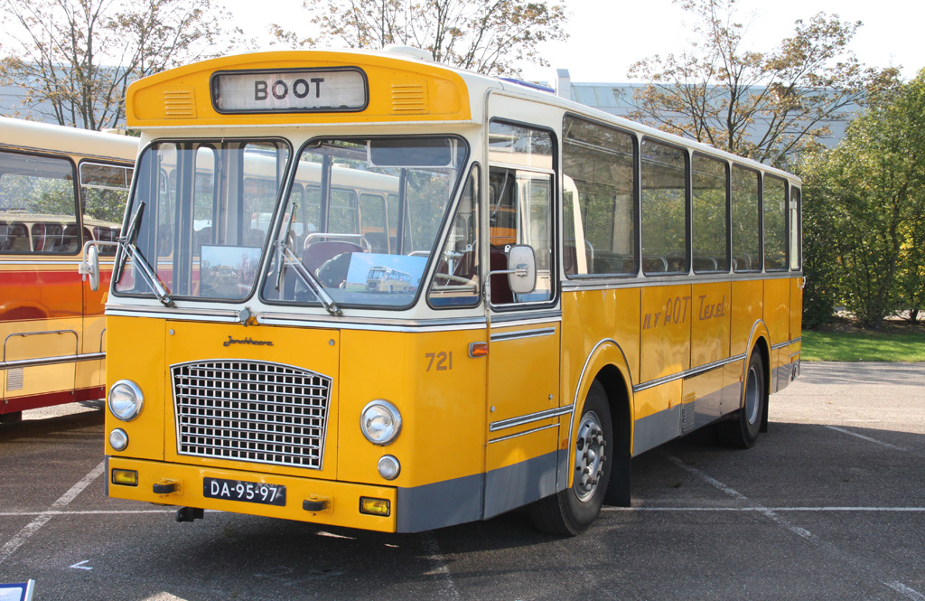 Museumbus AOT 721 uit 1972 van een particulier uit Noord-Holland op de DAF-museumdagen in 2011.